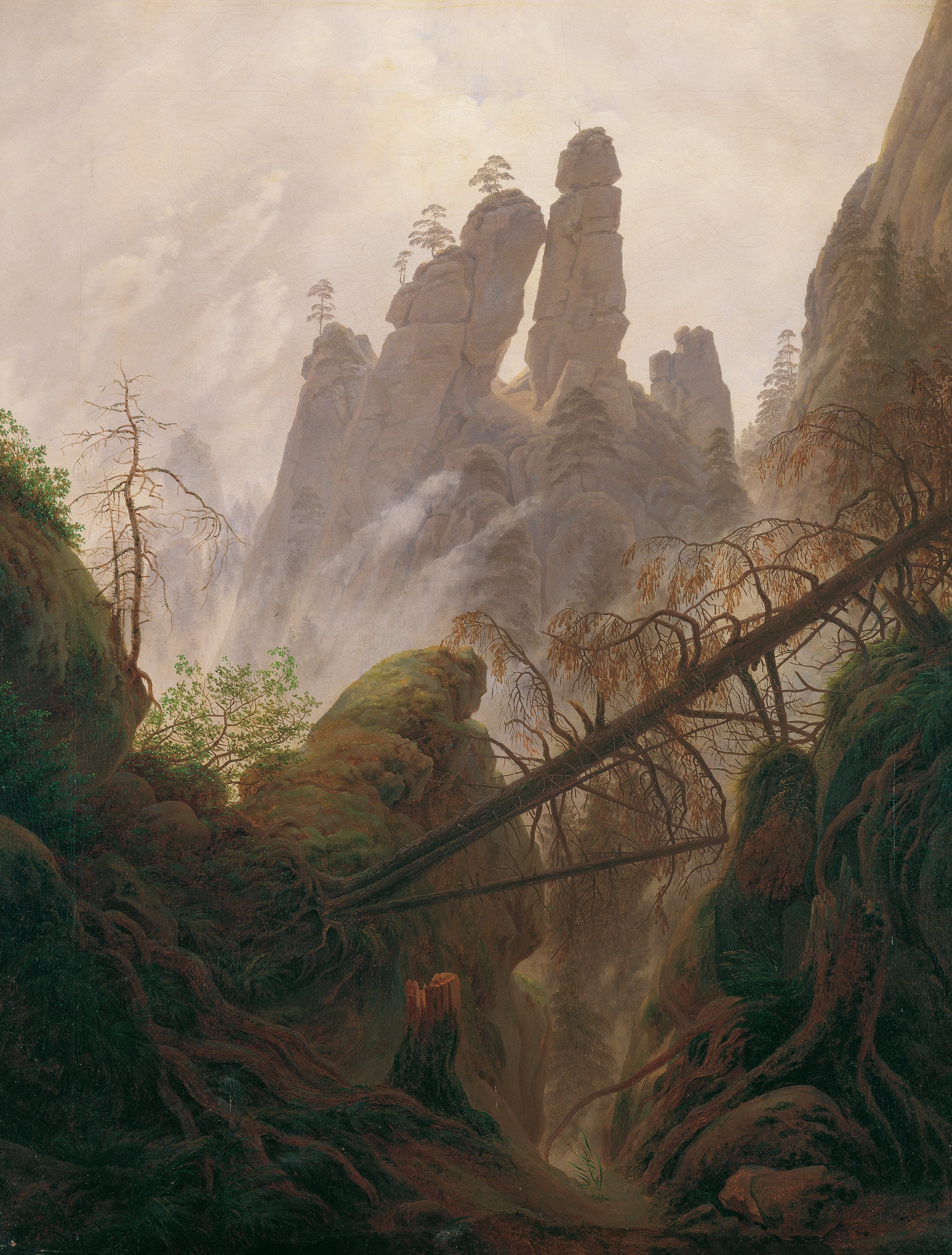 Dargestellt ist die Felsengruppe des Neurathener Felsentores (heute: Kleine Steinschleuder).[1] ↑ nationalpark-saechsische-schweiz.de